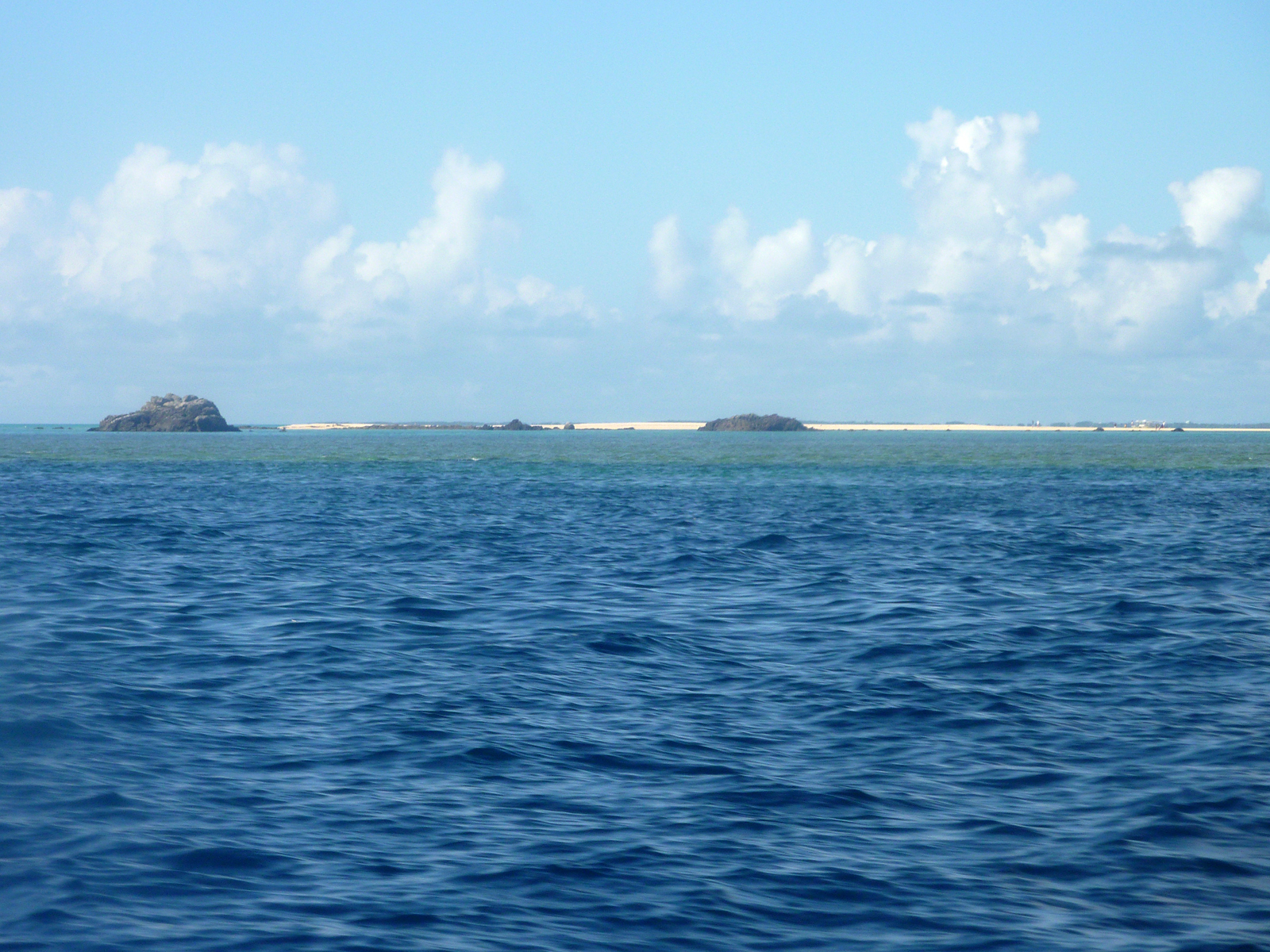 浜島（沖縄県八重山郡竹富町）